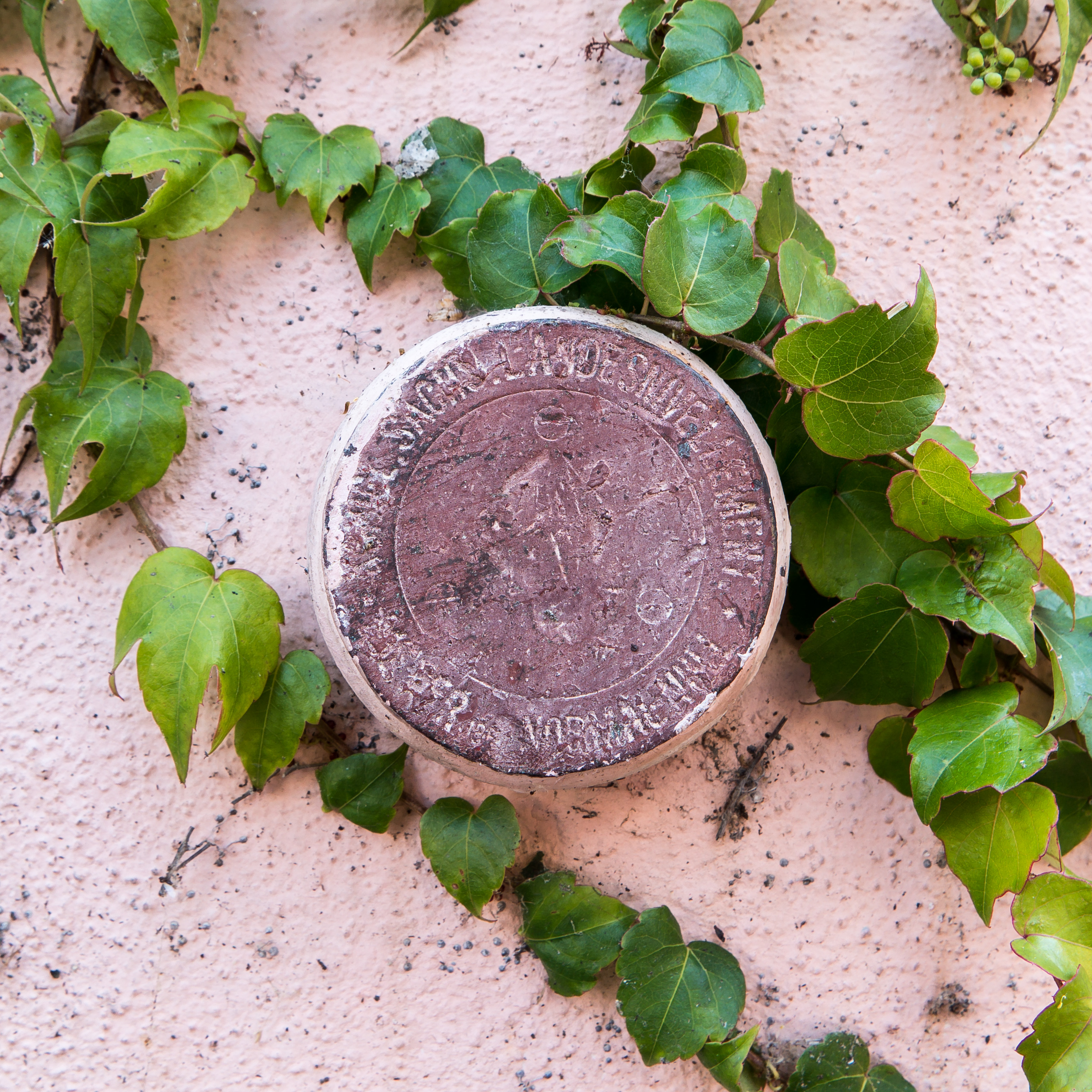 SÄCHSISCHES LANDESNIVELLEMENT NORMAL_NULL am Rathaus in Wurzen